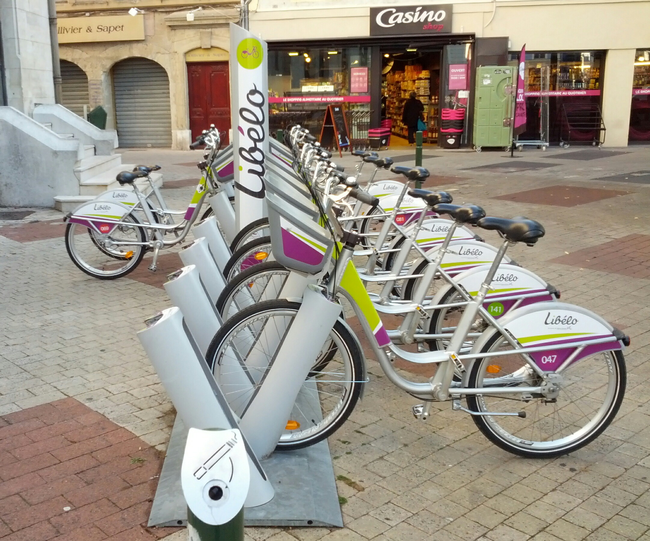 Vélos Libélo à Valence.